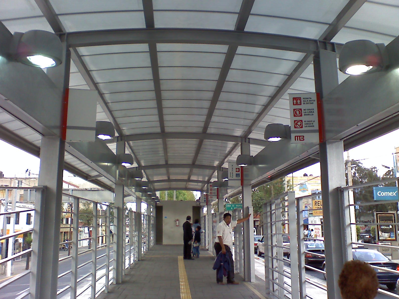 Vista interior de la estacion Ayuntamiento del metrobus. Mexico D.F.